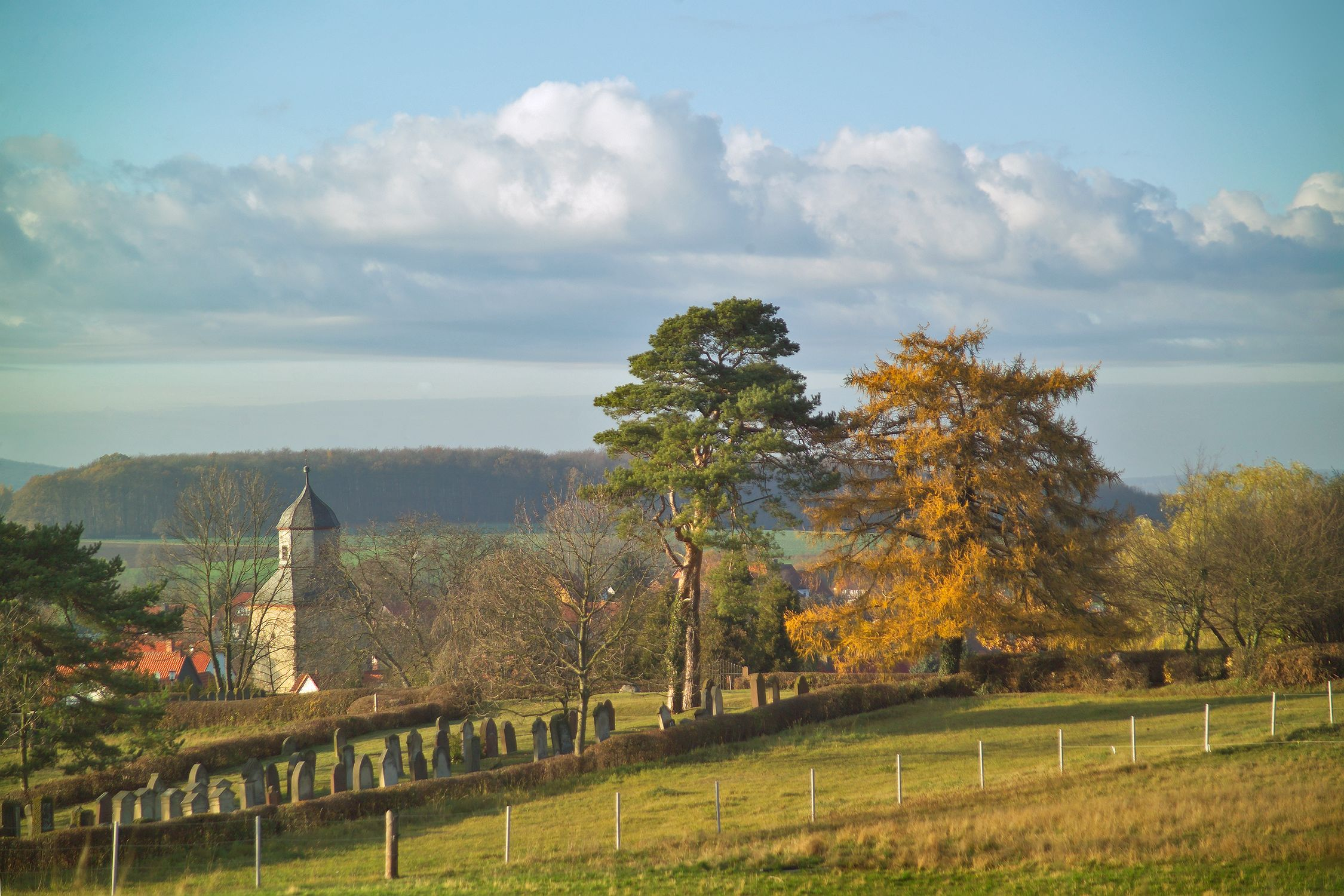 Der jüdische Friedhof in Meimbressen, Ansicht mit Ort und der Kirche.